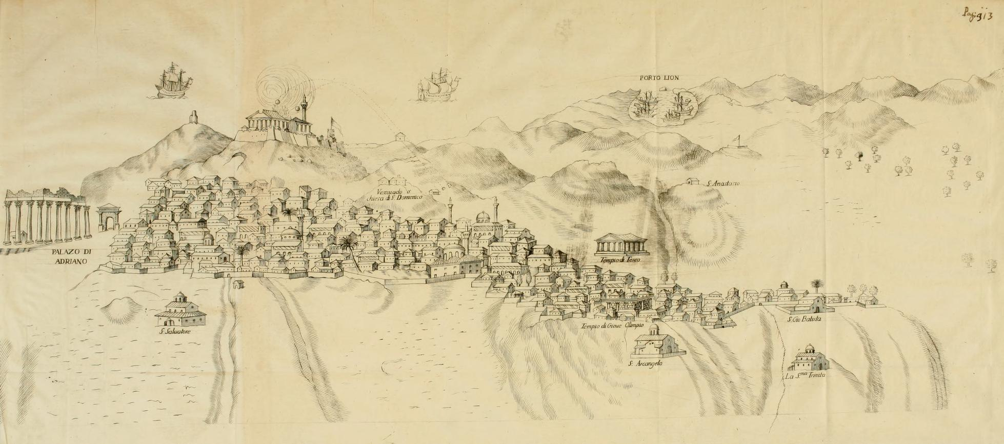 Veduta di Atene. Stampa tratta da: Atene attica, descritta da suoi principii fino all'acquisto fatto dall'Armi venete nel 1687. Colla relazione de suoi rè, prencipi, arconti, e tiranni. Suoi magistrati consigli. Con varietà di medaglie, rittratti, e dissegni di Francesco Fanelli. Published 1707 by Appresso A. Bortoli in Venezia.